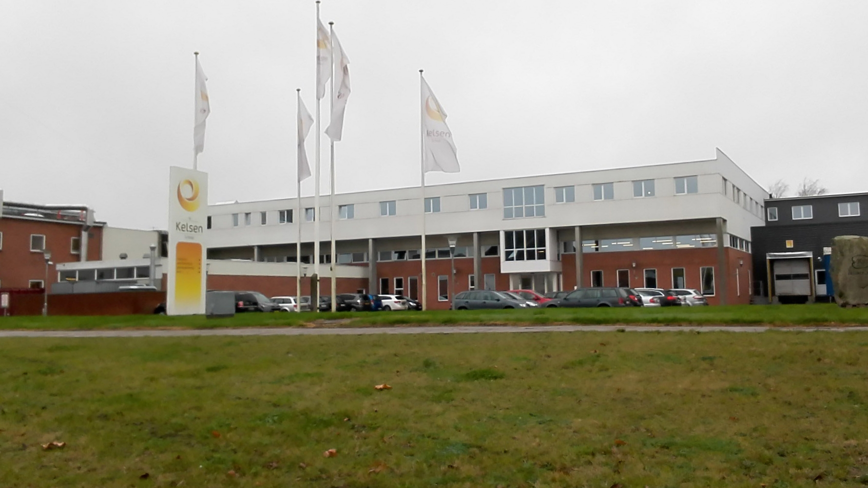 Kelsens hovedkvarter i Nørre Snede - th. en mindesten, bekostet af medarbejderne